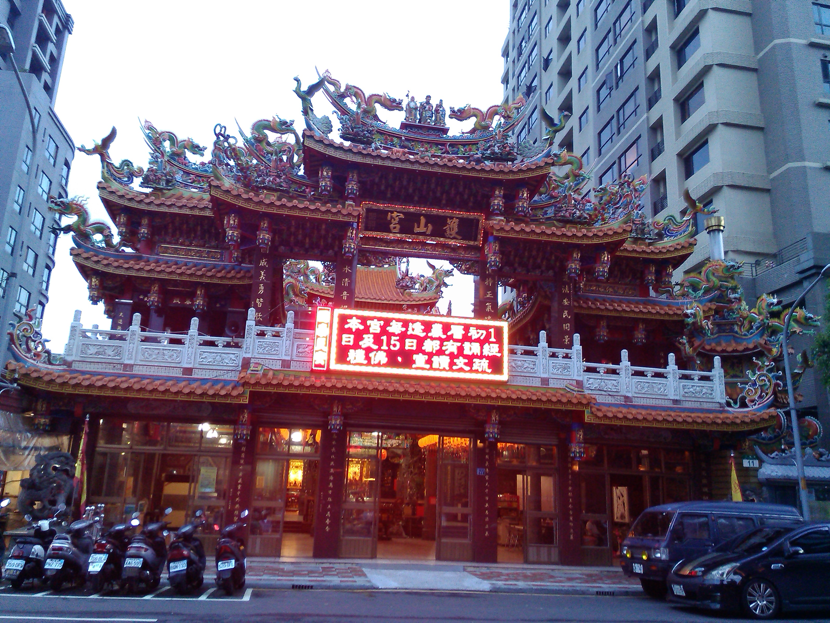 新北市三重區護山宮，主祀護國尊王張巡。